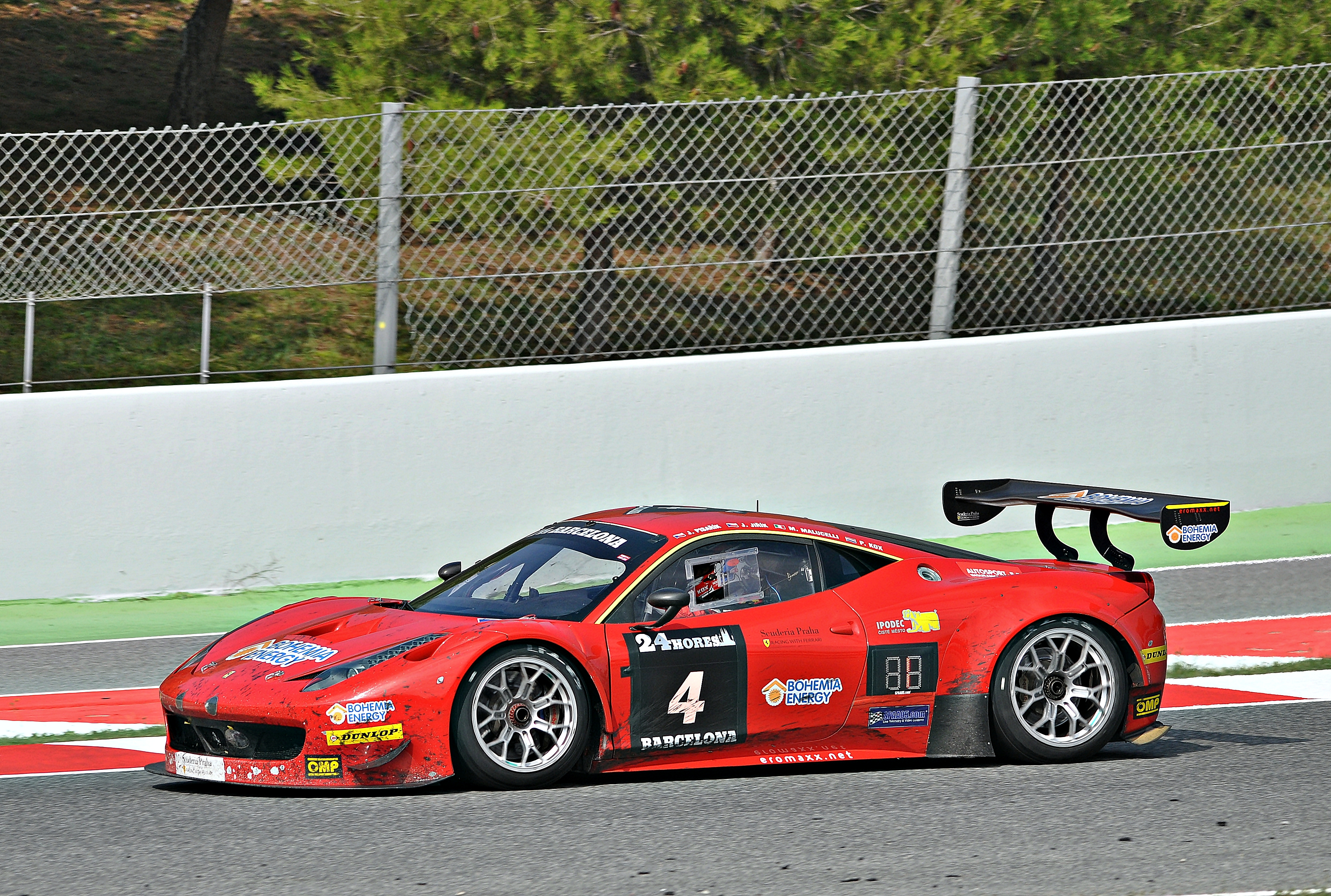 ferrari 458 en las 24 horas de Barcelona de automovilsmo-2014